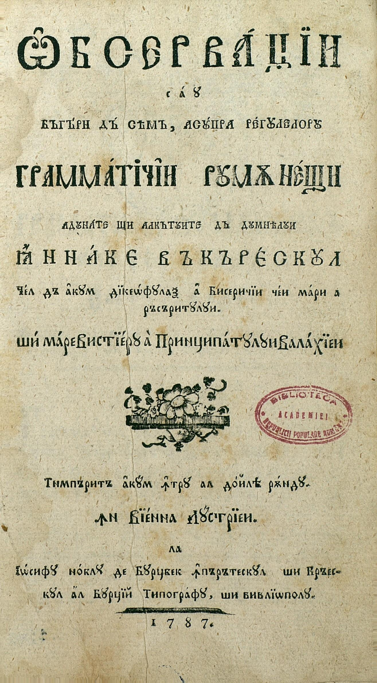 Lucrarea „Observații sau băgări de seamă asupra regulelor Gramaticii rumânești”, Viena, 1787, de Ienăchiță Văcărescu